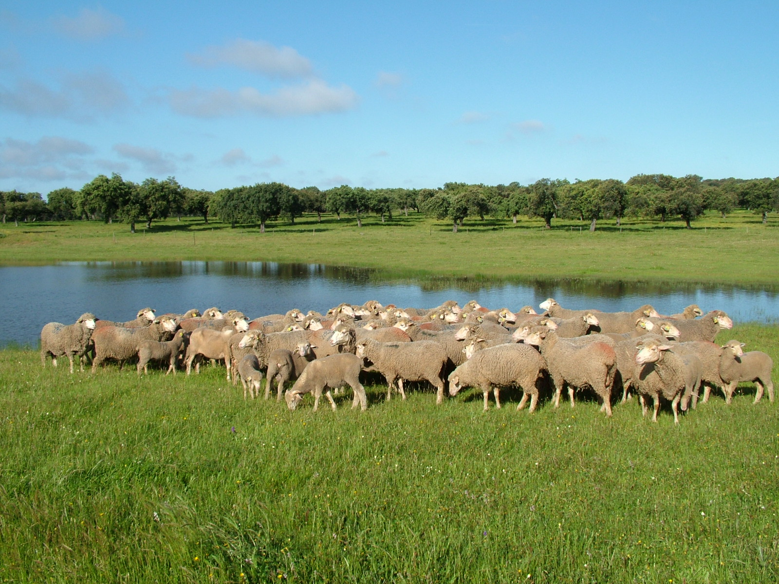 Ovejas merinas pastando en la dehesa de Extremadura